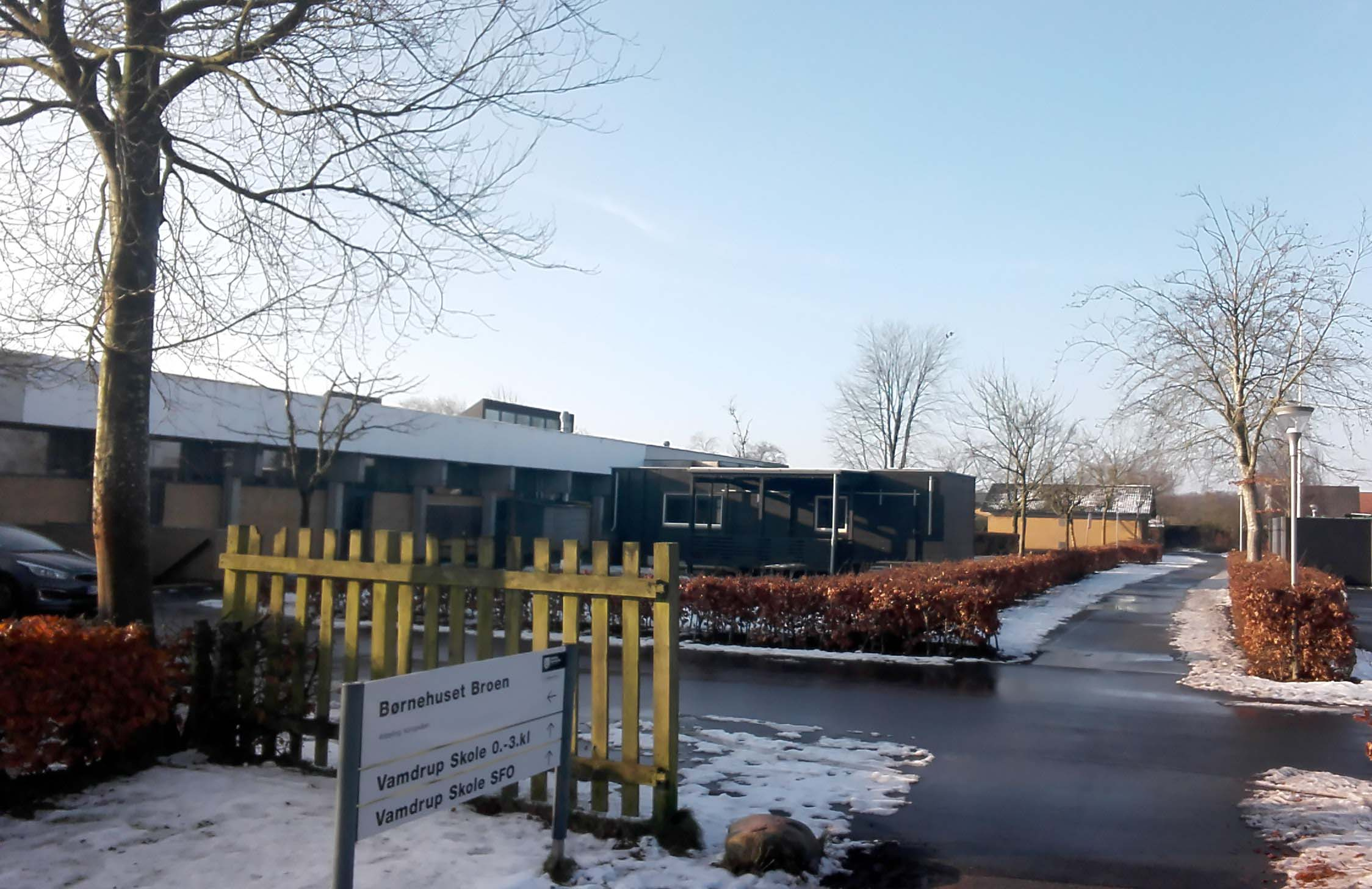 Vamdrup Skoles afdeling for 0.-3. aldersklasse